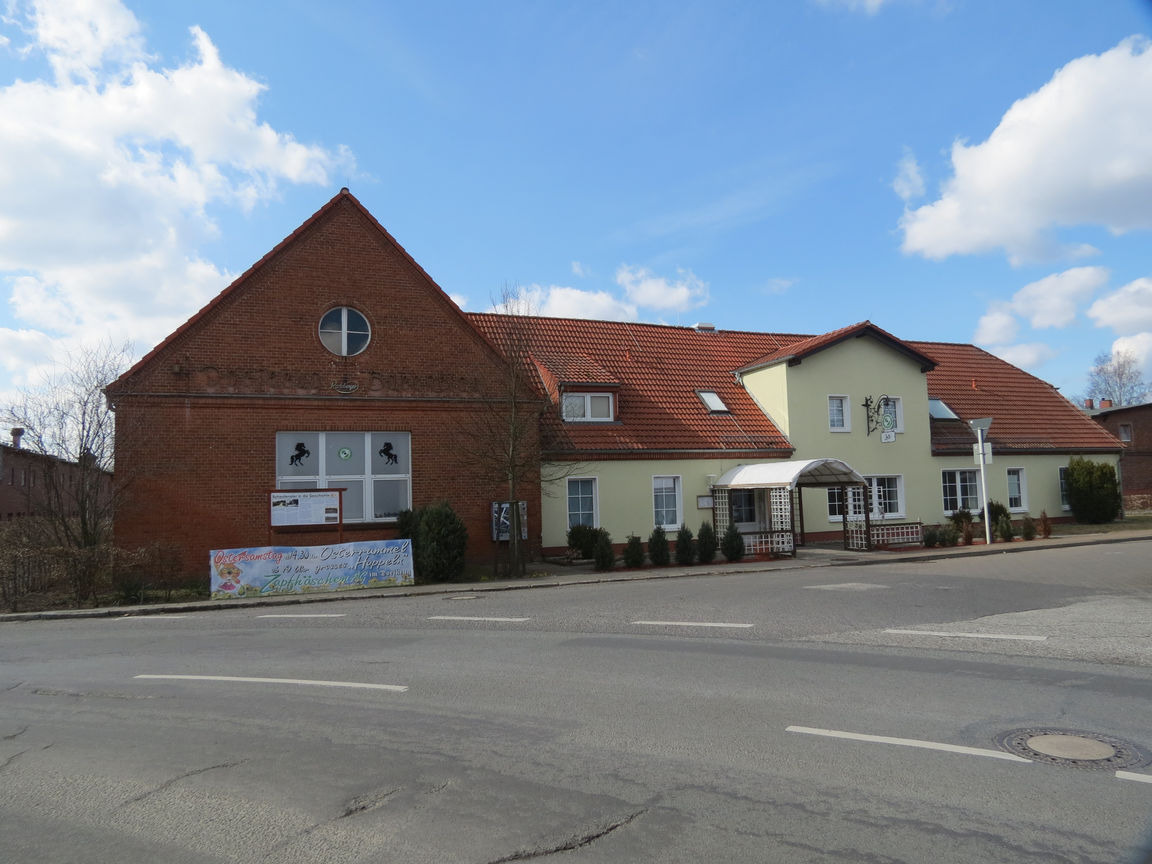 Dorfkrug und früheres Beamtengebäude des Remontedepot Bärenklau, Gemeinde Oberkrämer im Landkreis Oberhavel, Brandenburg